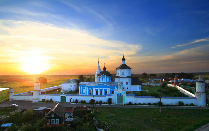 Коломенский район, Московская область. Бобренев монастырь